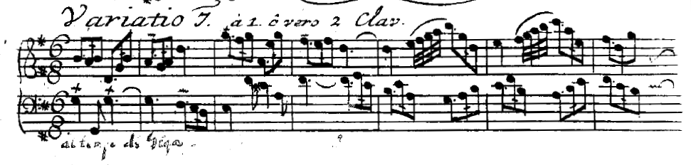 Beginn der 7. Variation aus den "Goldberg-Variationen".